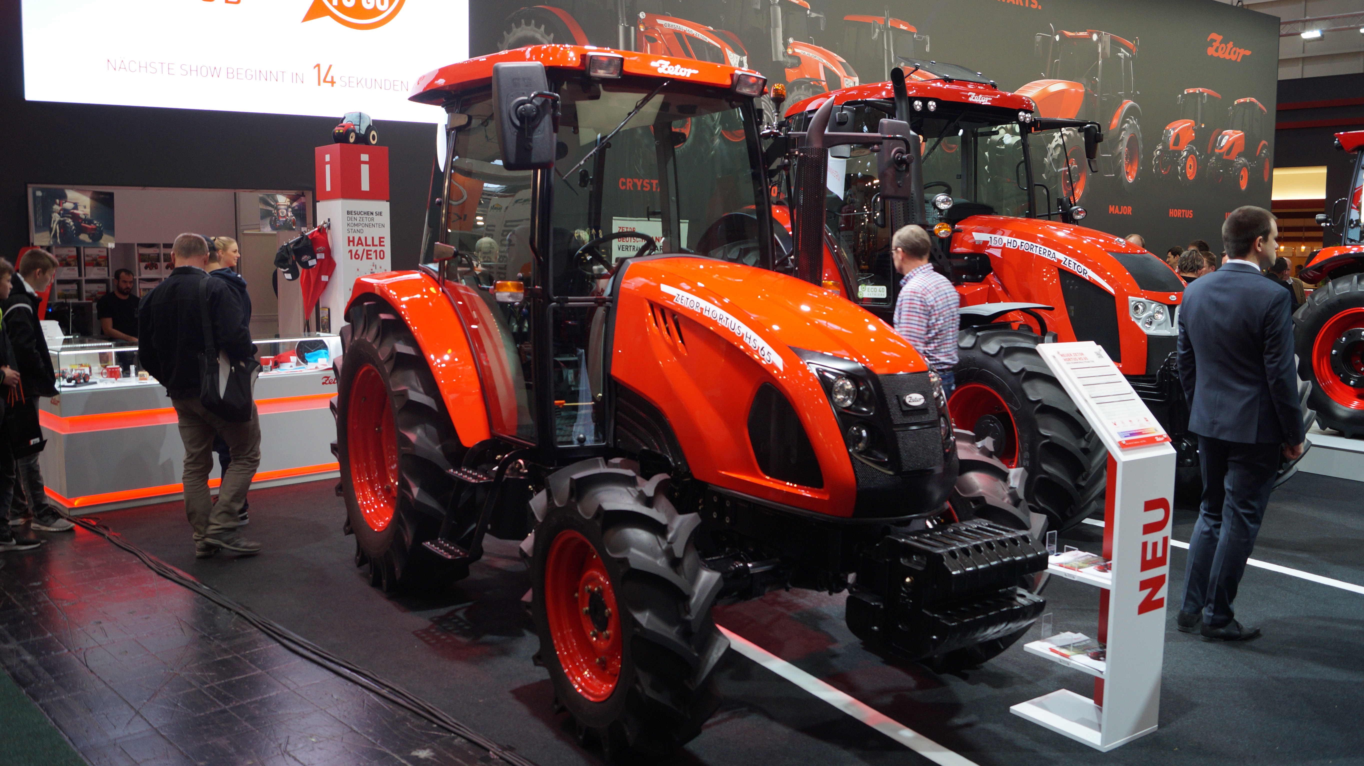 Schrägansicht der Front eines Zetor Hortus HS 65, ausgestellt auf der Agritechnica 2017.